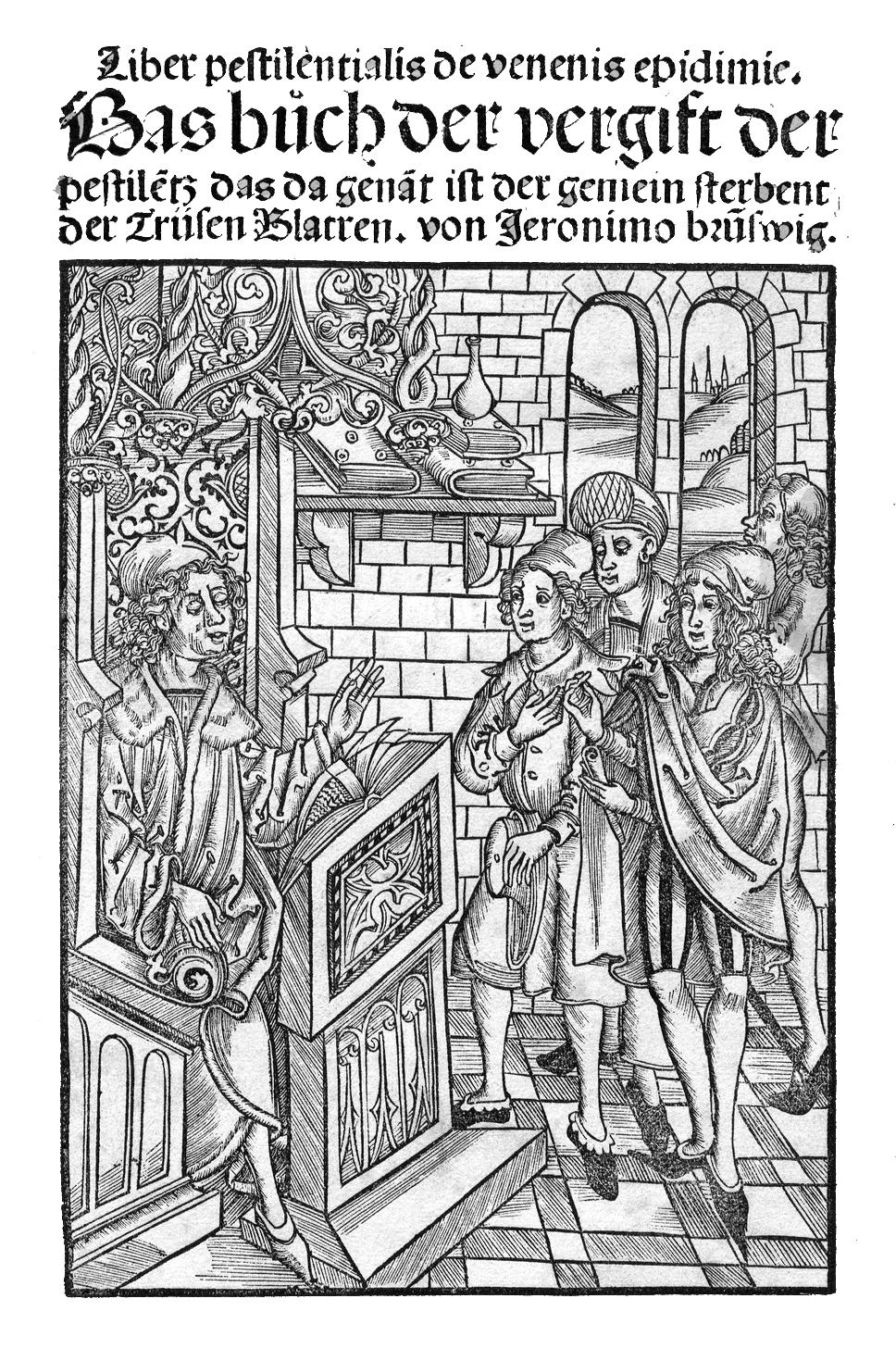 Titelblatt